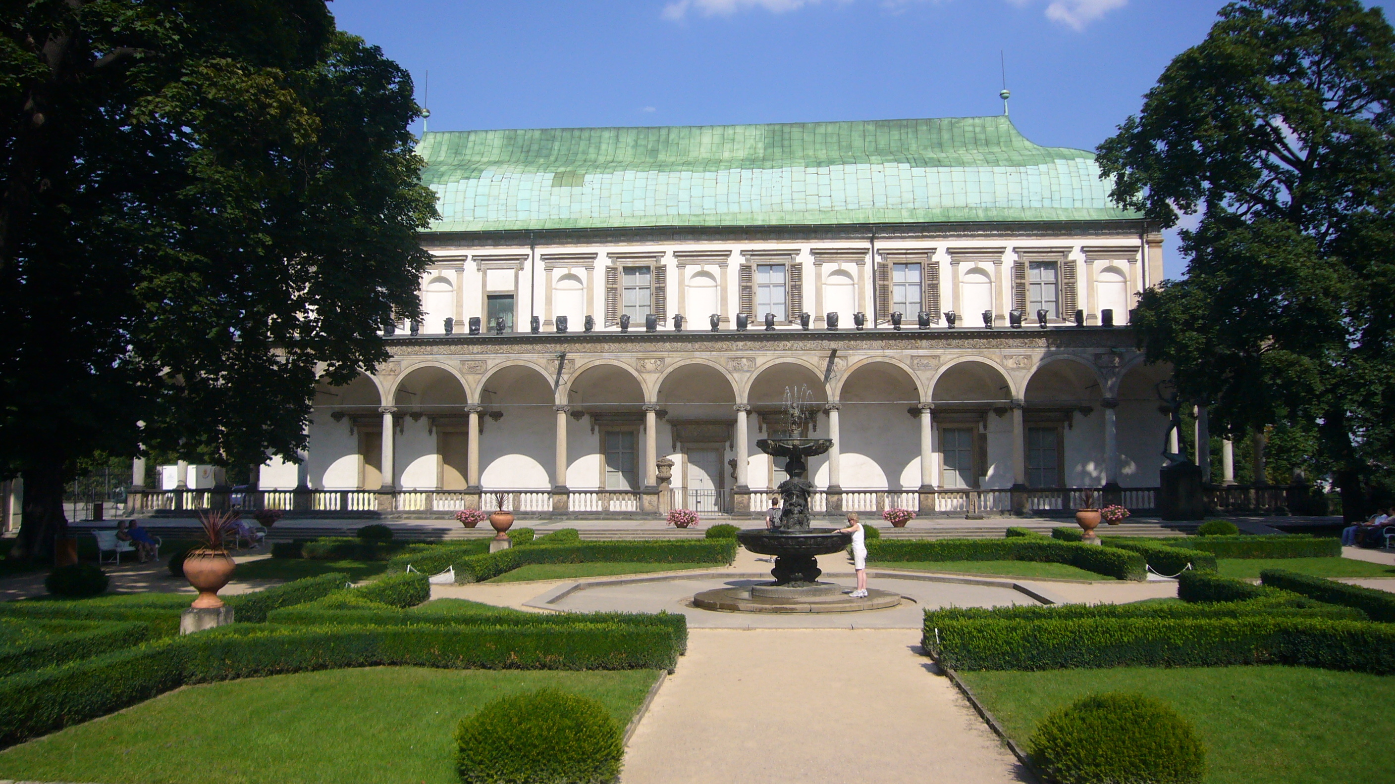 Pražský hrad, Letohrádek královny Anny